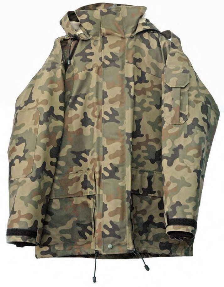 Wzór kurtki ubrania na złą pogodę z podpinką Straży Granicznej